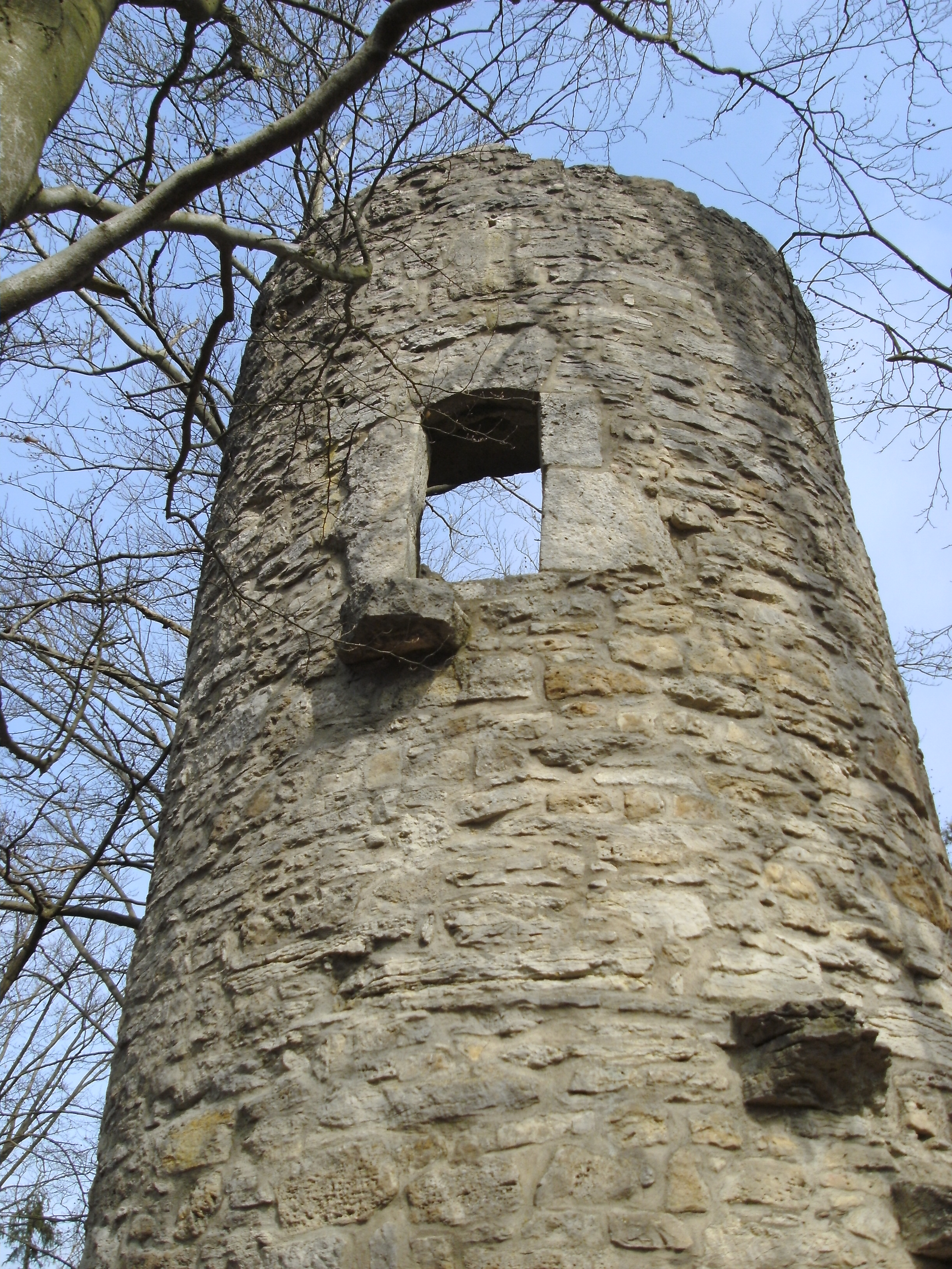 Das Einstiegsloch der Stockheimer Warte sowie treppenförmig angeordnete, herausragende Steine